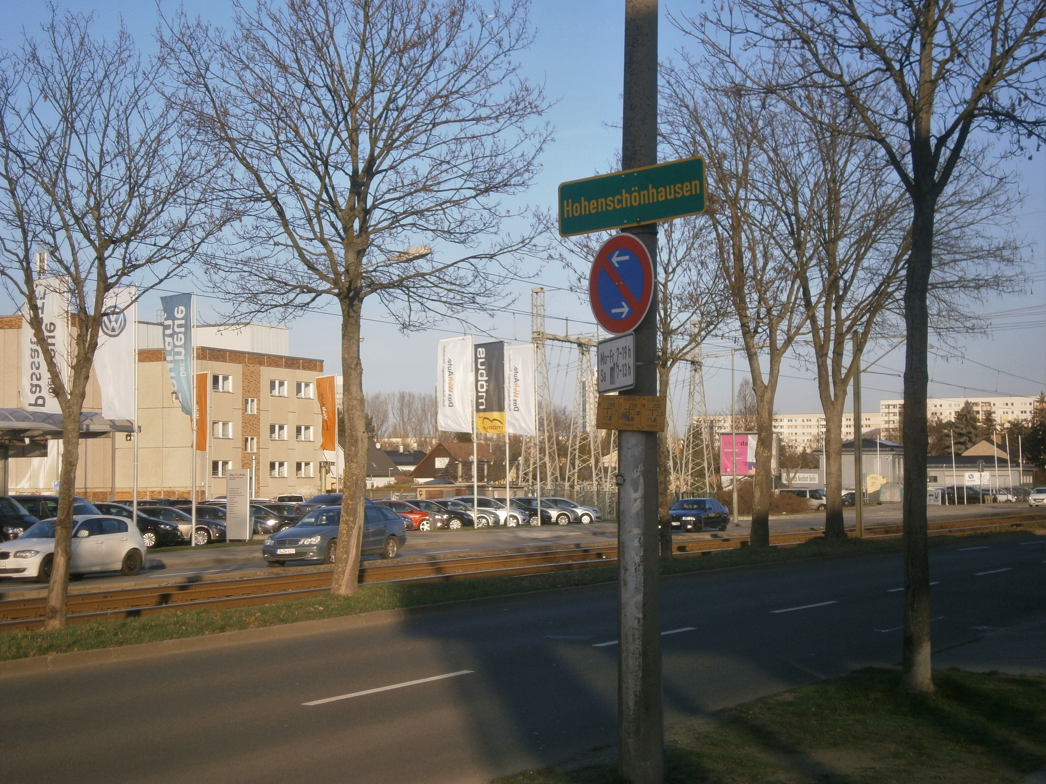 Die Hansastraße ist eine Berliner Straße mit übergeordneter Bedeutung in den Ortsteilen Alt-Hohenschönhausen und Weißensee. Sie liegt zwischen der Indira-Gandhi-Straße und der Großsiedlung Hohenschönhausen-Nord. Im Bild der Blick von der östlichen Straßenseite auf die seit den 1930er Jahren bestehenden Wohnhäuser an der gegenüberliegenden Straßenseite. Deren Bewohner nutzen diese Gebäude seit 1990 gewerblich, so ist die Strßenseite kleinteilig bebaut und löst die südlicheren großflächigen Gewerbegrundstücke der Autohäuser ab.